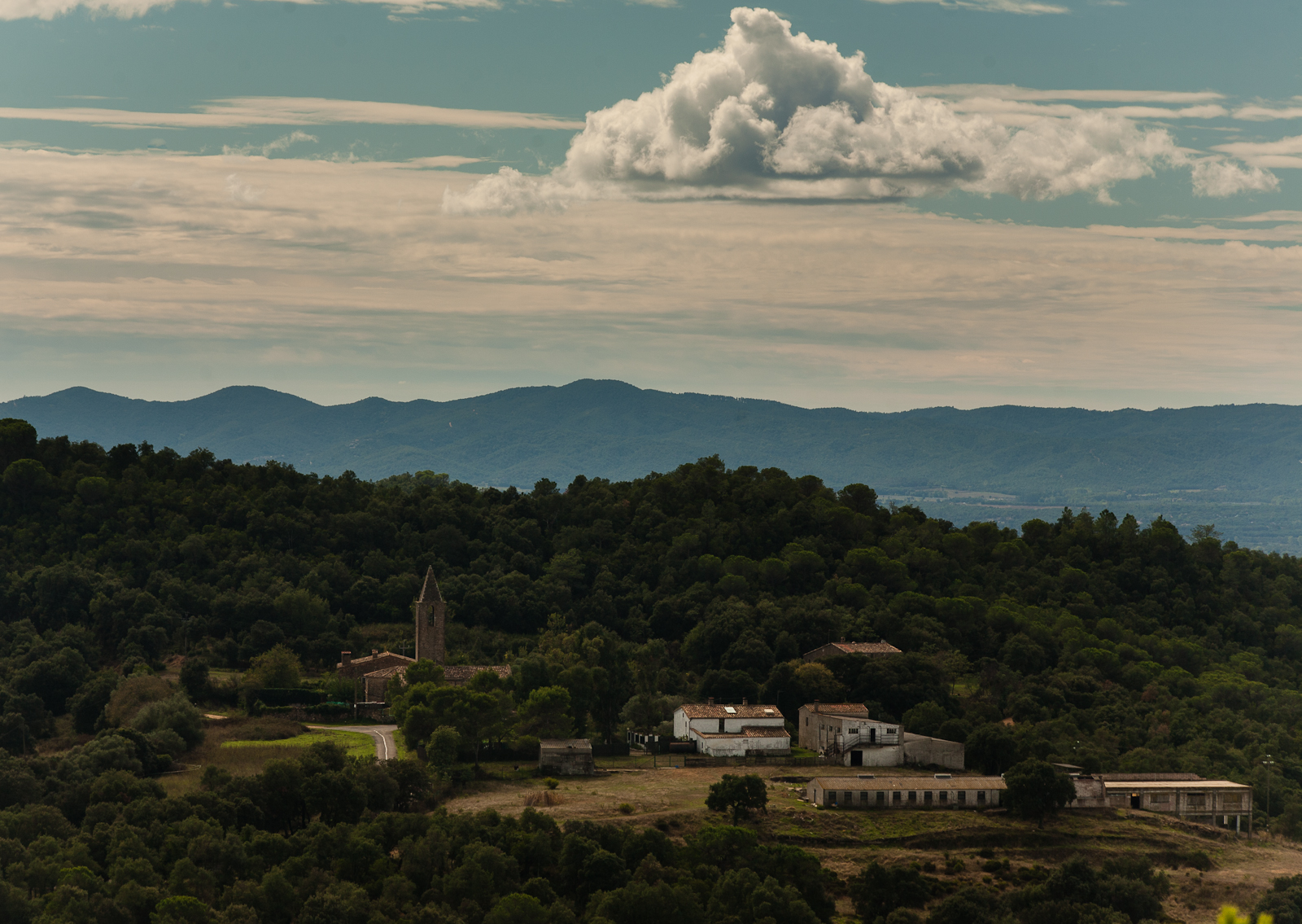 Vista de la ubicació de l'Esglèsia de Sant Mateu de Montnegre (Quart), a les Gavarres.